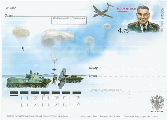 Почтовая карточка Росиии - Маргелов Василий Филиппович